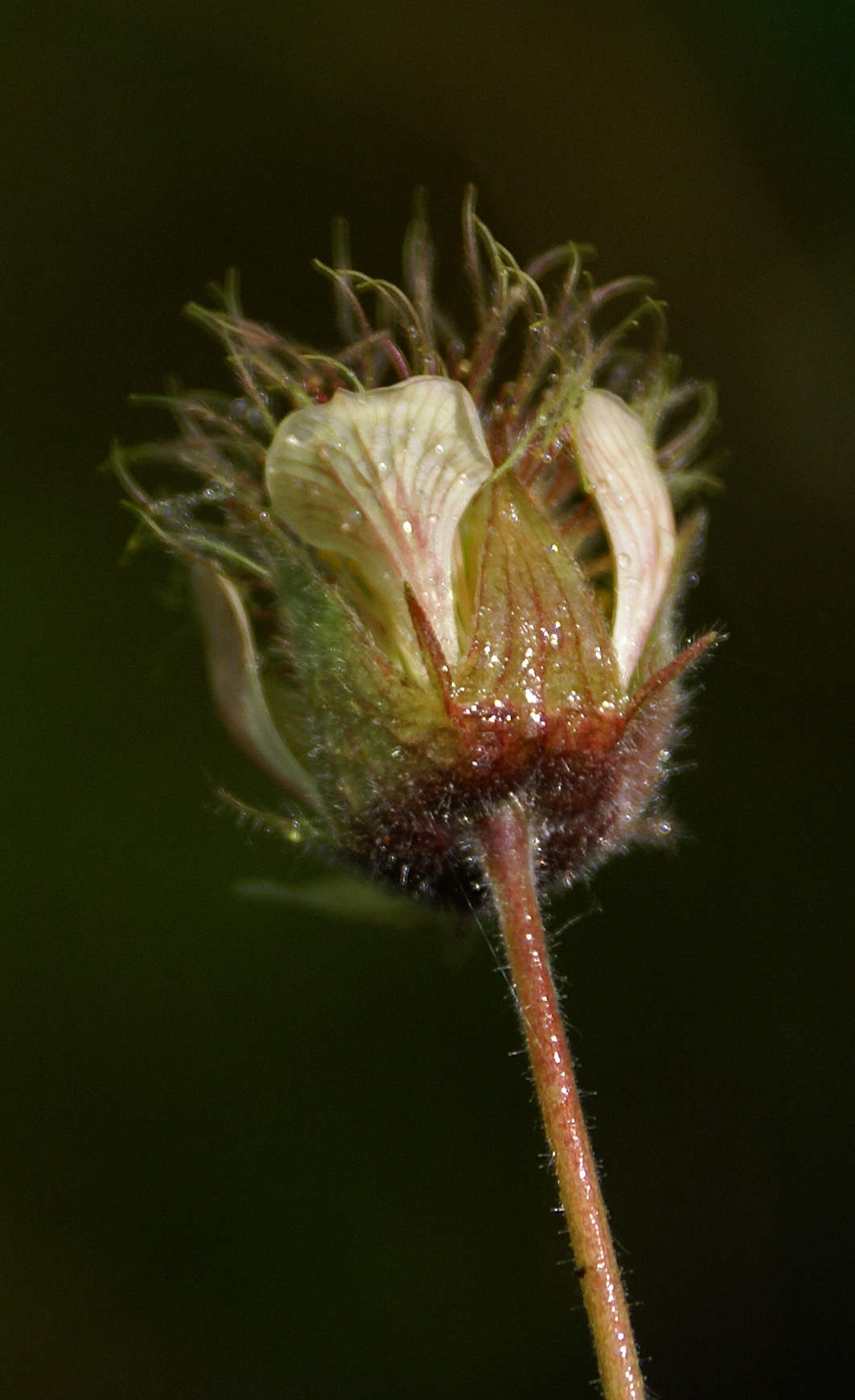 Enghumleblom - Water Avens - Geum rivale